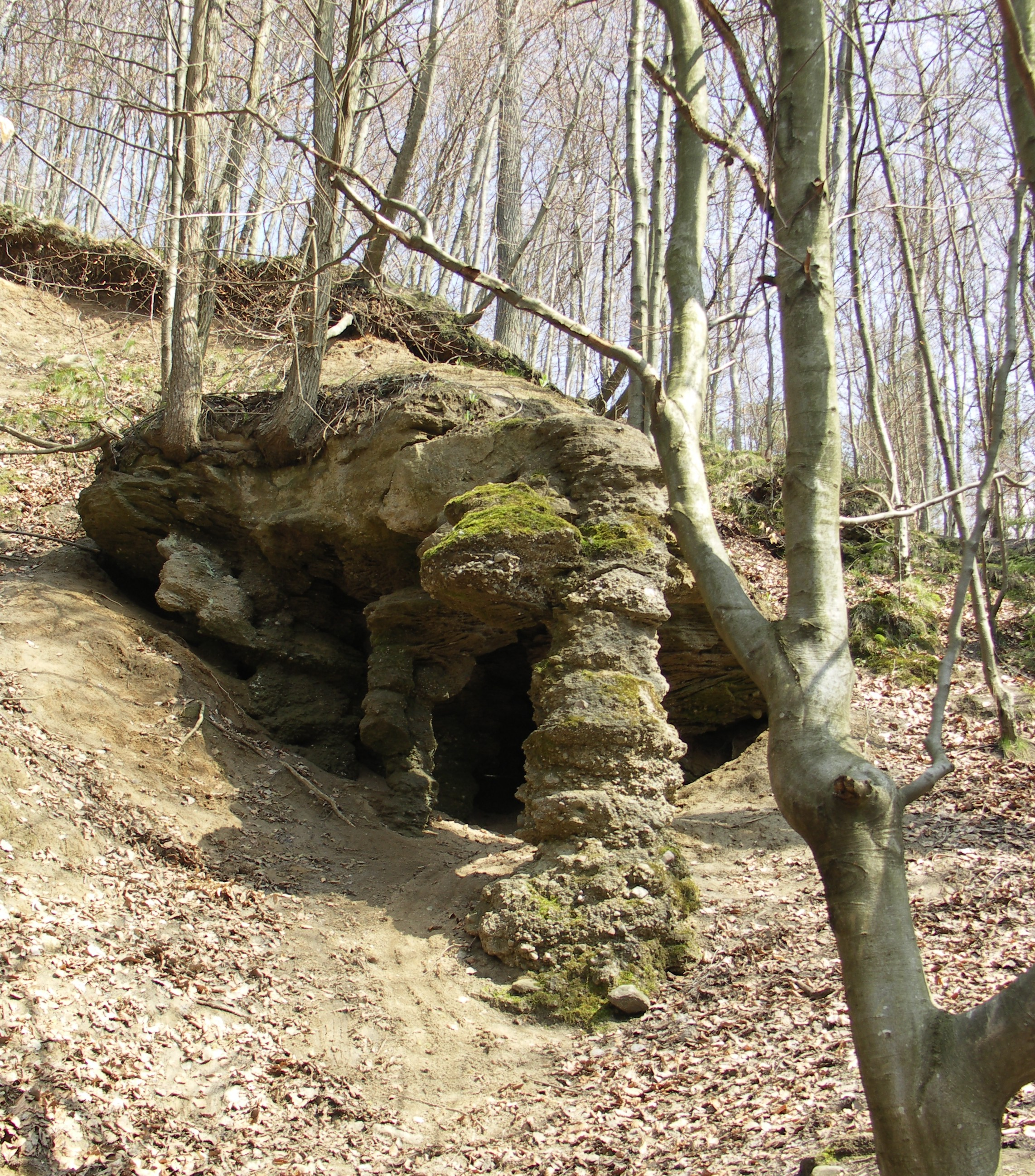 Cave nearby Lubygość lake